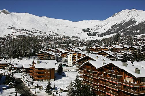 Blick aus der Gondel (Verbier)